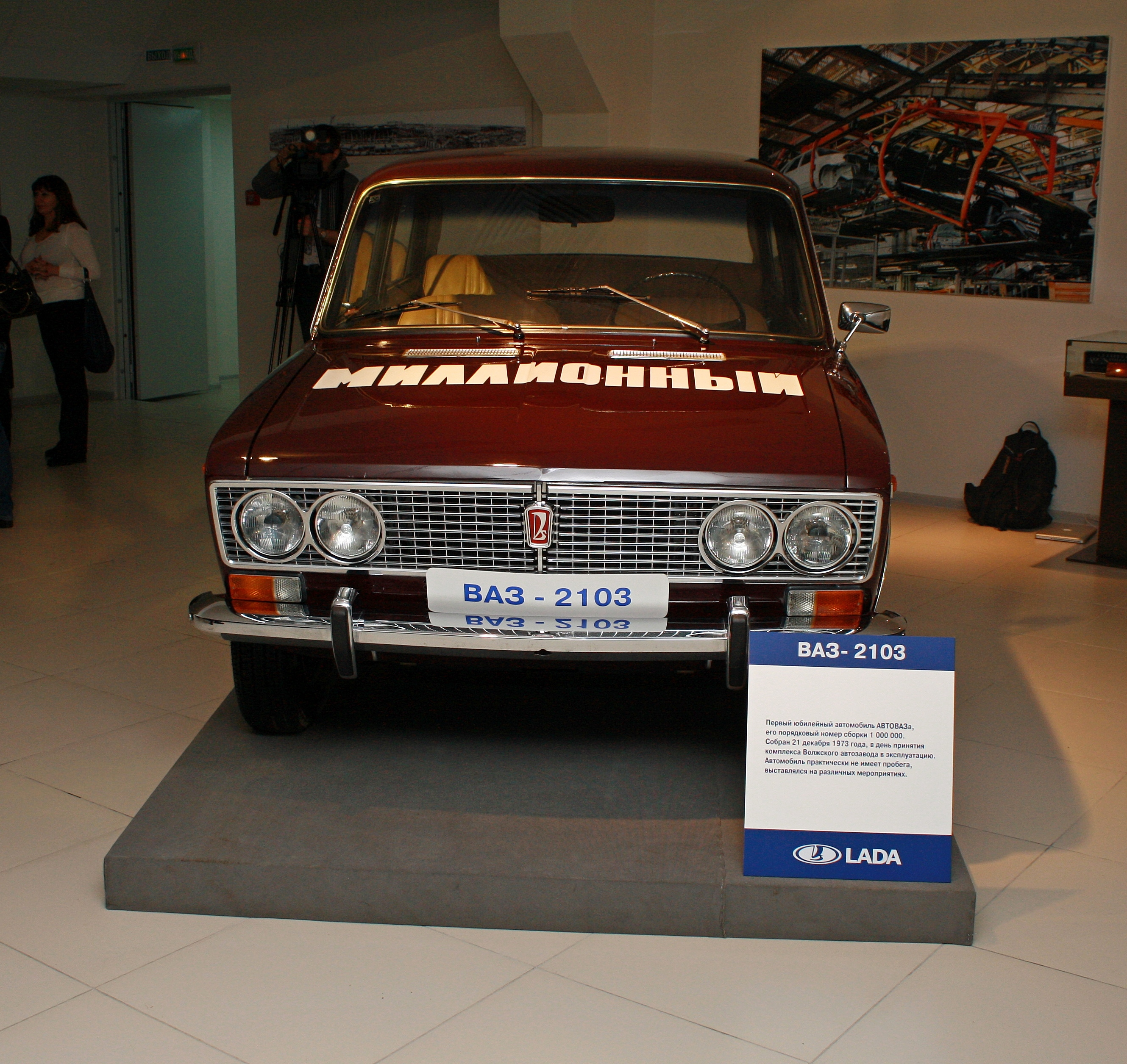 Первый юбилейный миллионный автомобиль АвтоВАЗа.